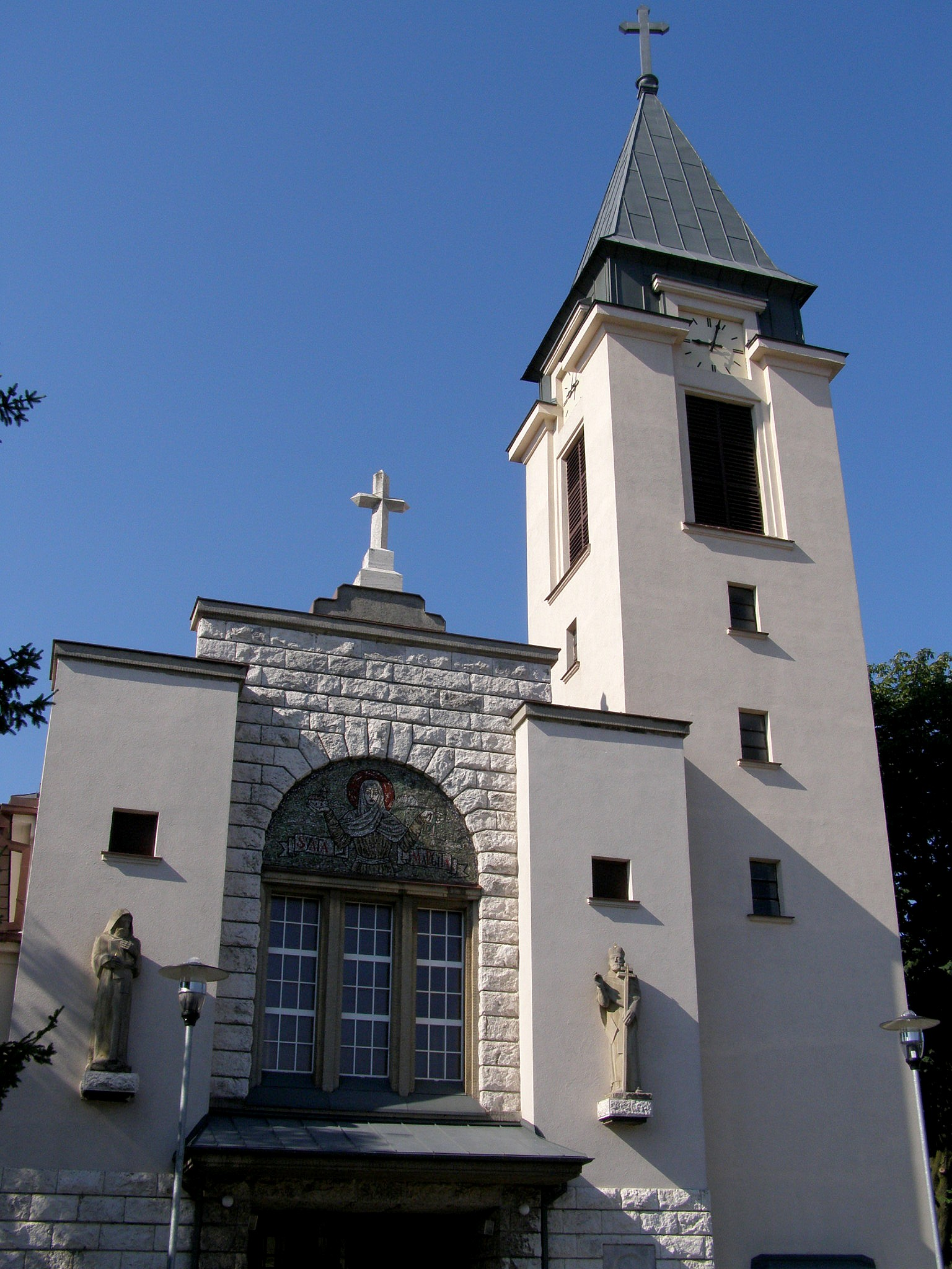 Priečelie Kostola svätej Margity v Lamači postaveného v rokoch 1947 - 1951 podľa plánov architekta Milana Michala Harminca